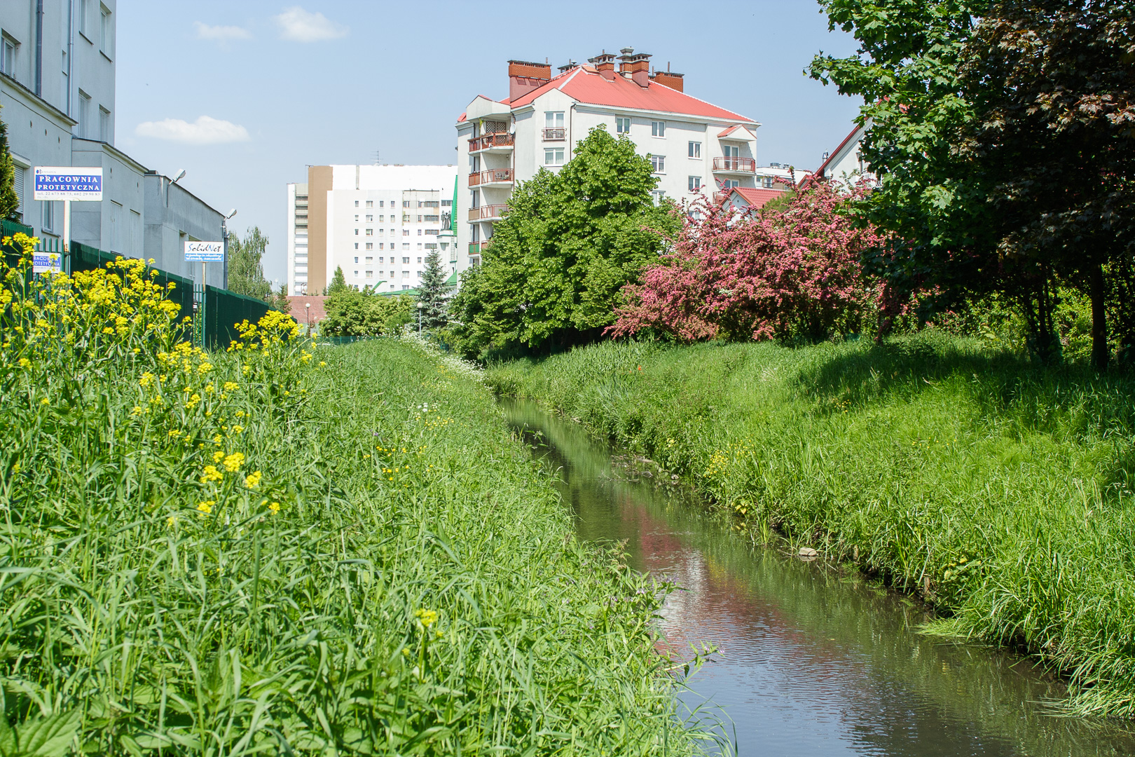 Kanał Gocławski przy ulicy Floriana Znanieckiego. Gocław, Warszawa.